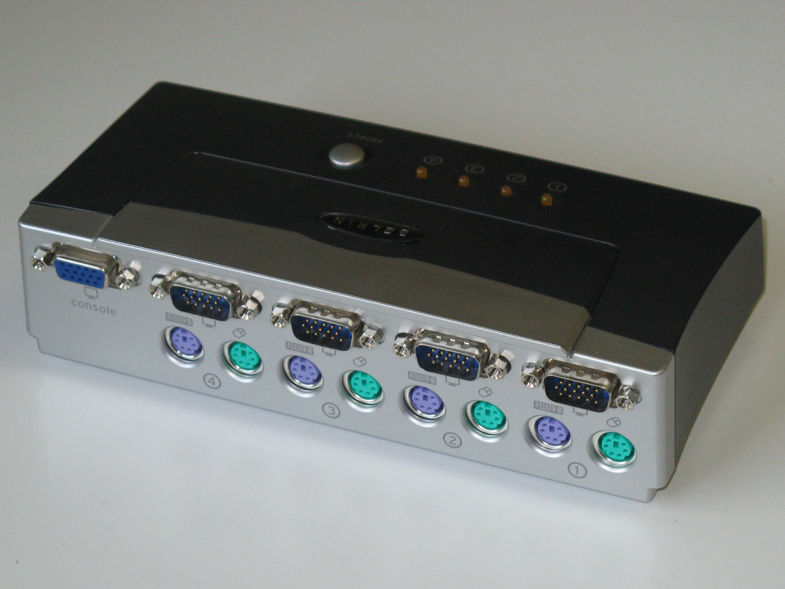 Belkin CPU Switch Model "OmniView E Series 4-Port KVM Switch F1DB104P" rückansicht